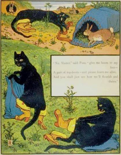 Гравюры по рисункам Крейна к сказке "Кот в Сапогах"